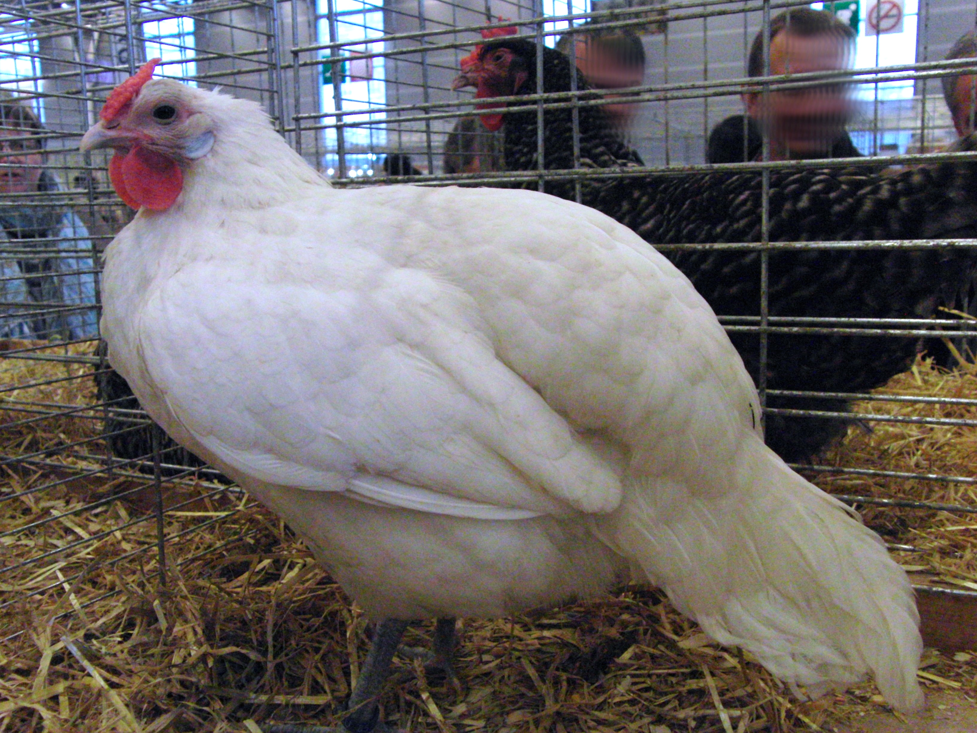 Poule d'Alsace - Salon international de l'agriculture 2013, Paris, France